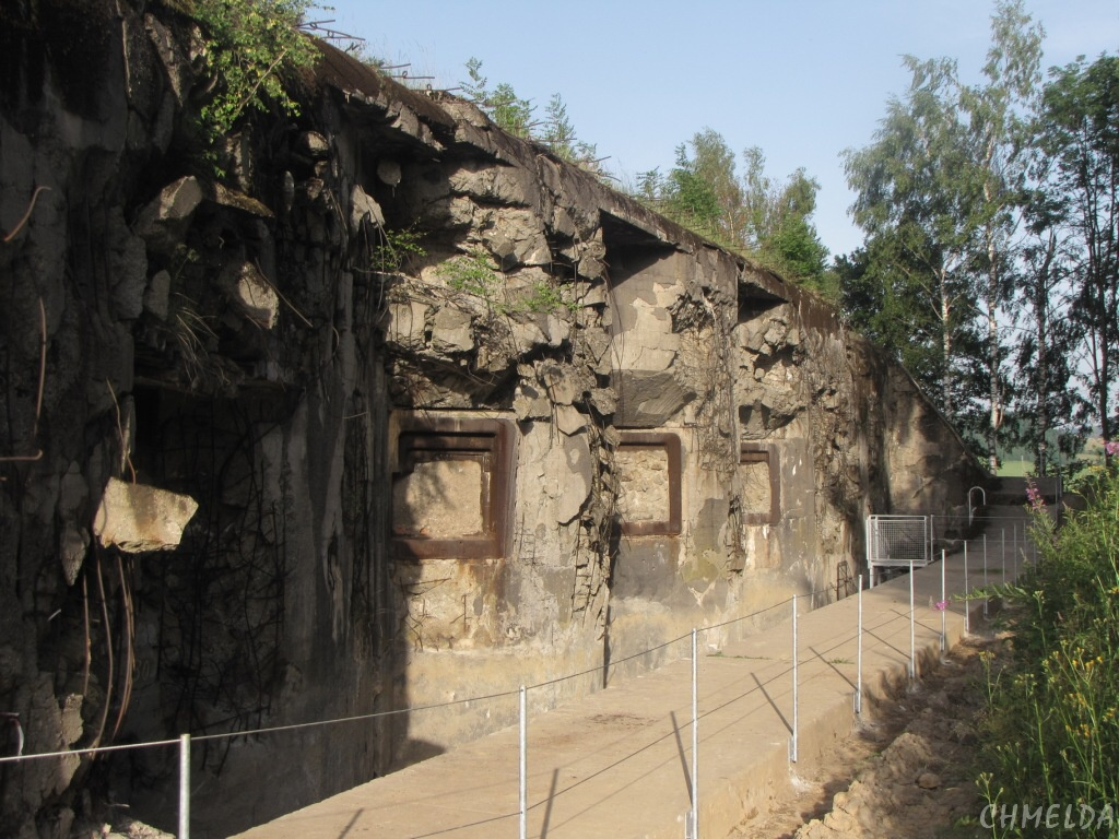 Dělostřelecký srub tvrze Hůrka - stav červen 2012